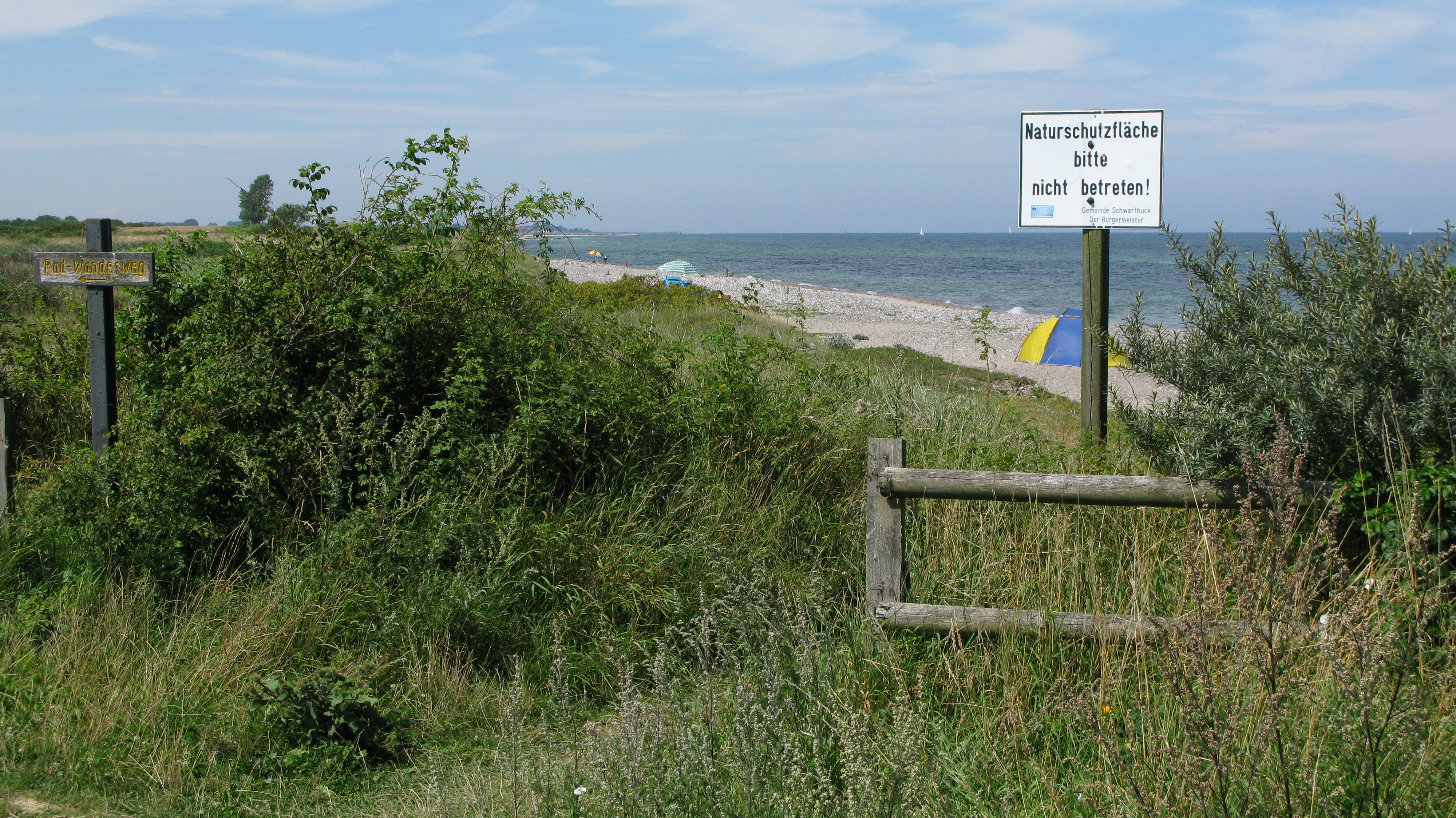 NSG Strandseelandschaft bei Schmoel